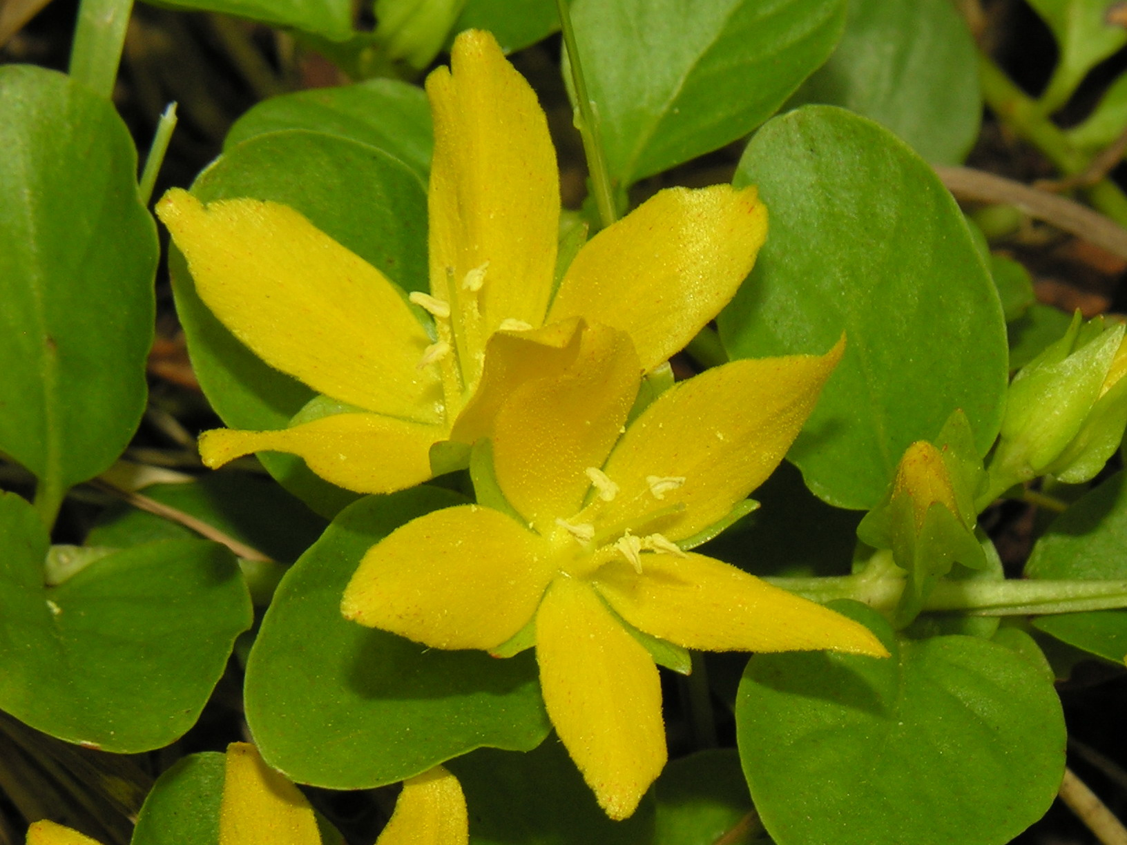 Šliaužiančioji šilingė (Lysimachia nummularia), žiedai Šeima. Mirsininiai (Myrsinaceae) Foto: Algirdas, 2006 m. liepos 1 d., Lietuva